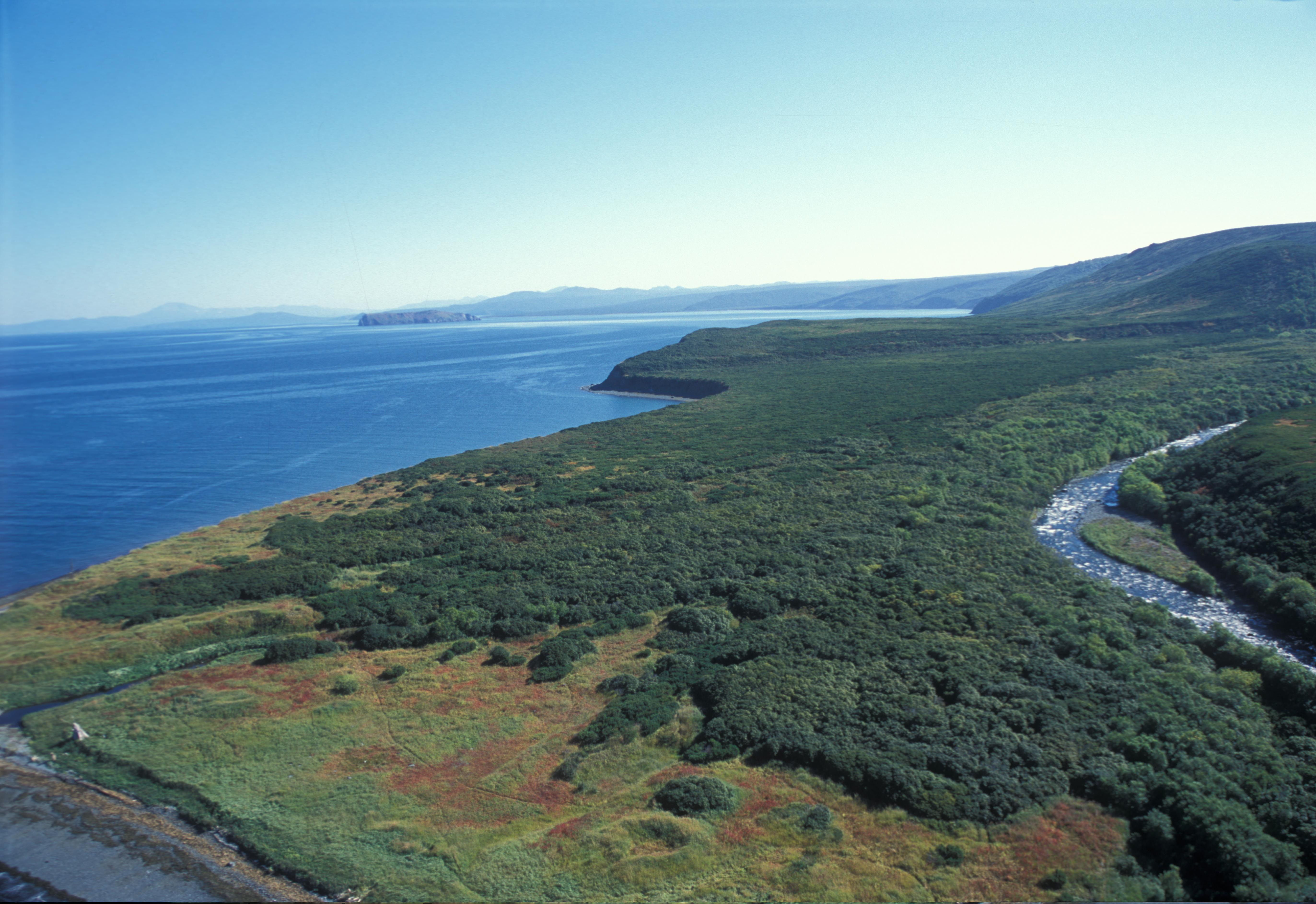 Магаданский заповедник, Ольский район This image is related to the protected area of Russia number 4900024